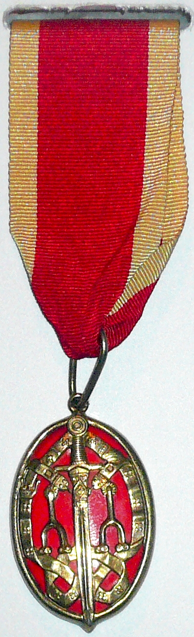 Медаль рыцаря-бакалавра. Сфотографировано в Историческом музее Гонконга.